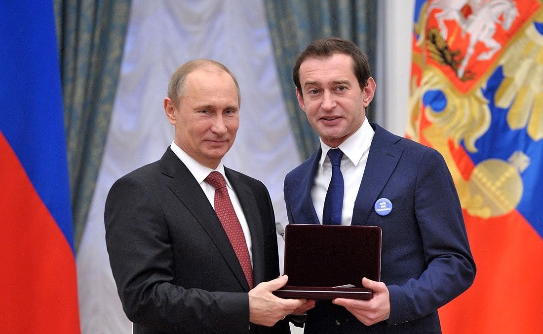 Церемония вручения государственных наград РФ. Почётное звание «Народный артист Российской Федерации» присвоено артисту Московского Художественного академического театра имени А.П. Чехова Константину Хабенскому